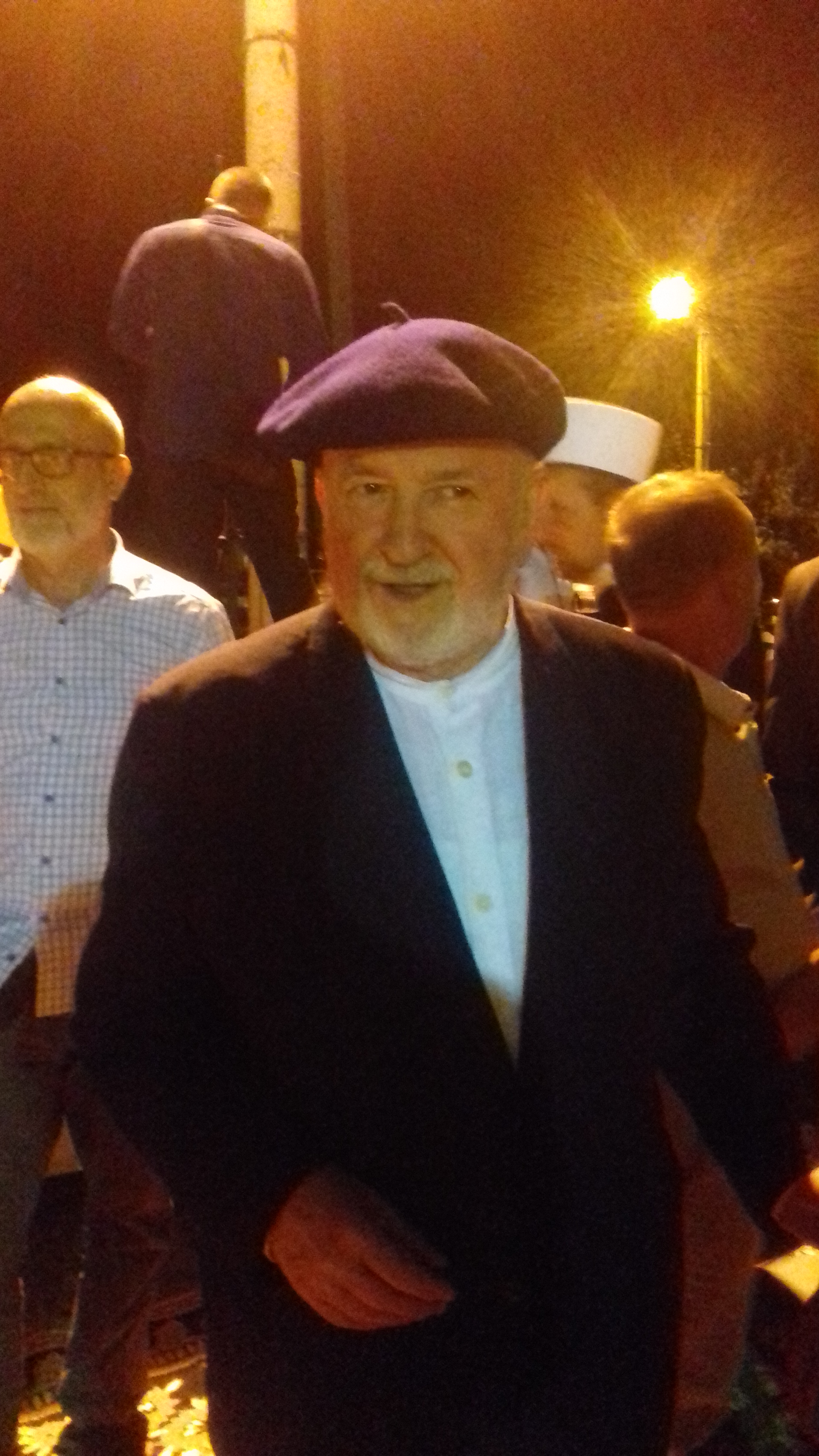 Џамија Нур, џемат Нур Хан, локација Перин Хан; манифестација обиљежавања 15 година од изградње џамије у Перином Хану и уједно и Нове године (хиџретске 1441), са гостом реисом др Мустафом еф. Церићем и другима